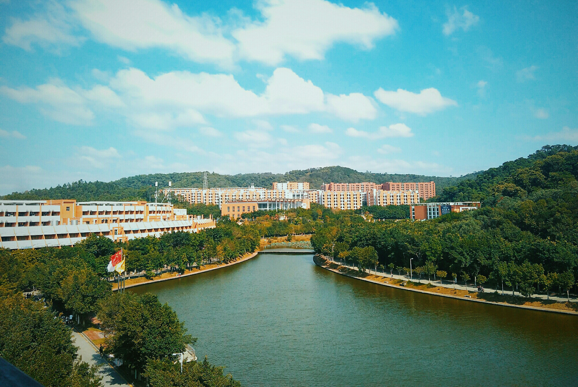 华南理工大学广州学院湖景